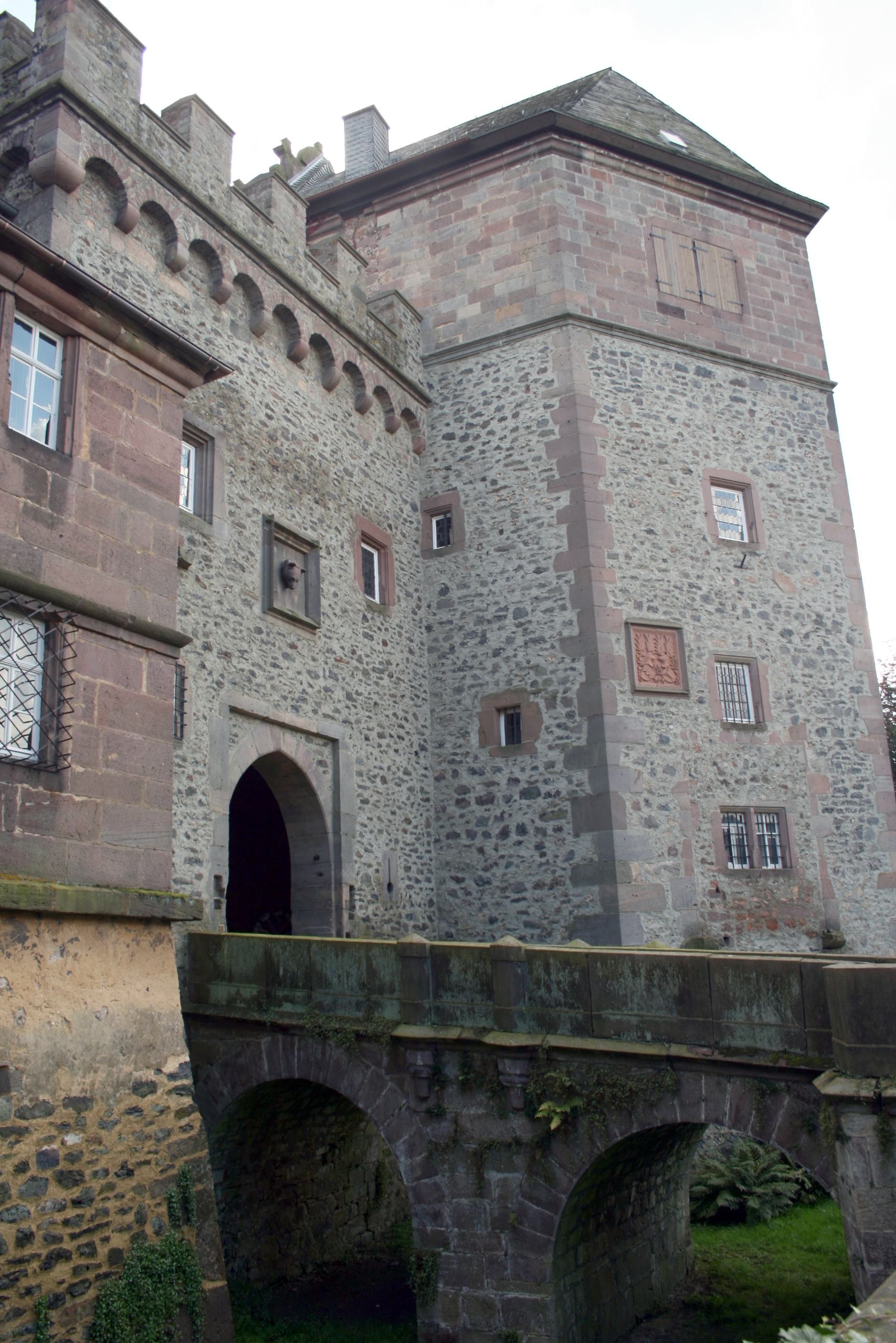 Schloss Eisenbach bei Lauterbach im mittelhessischen Vogelsberg: Brücke zur alten Kernburg